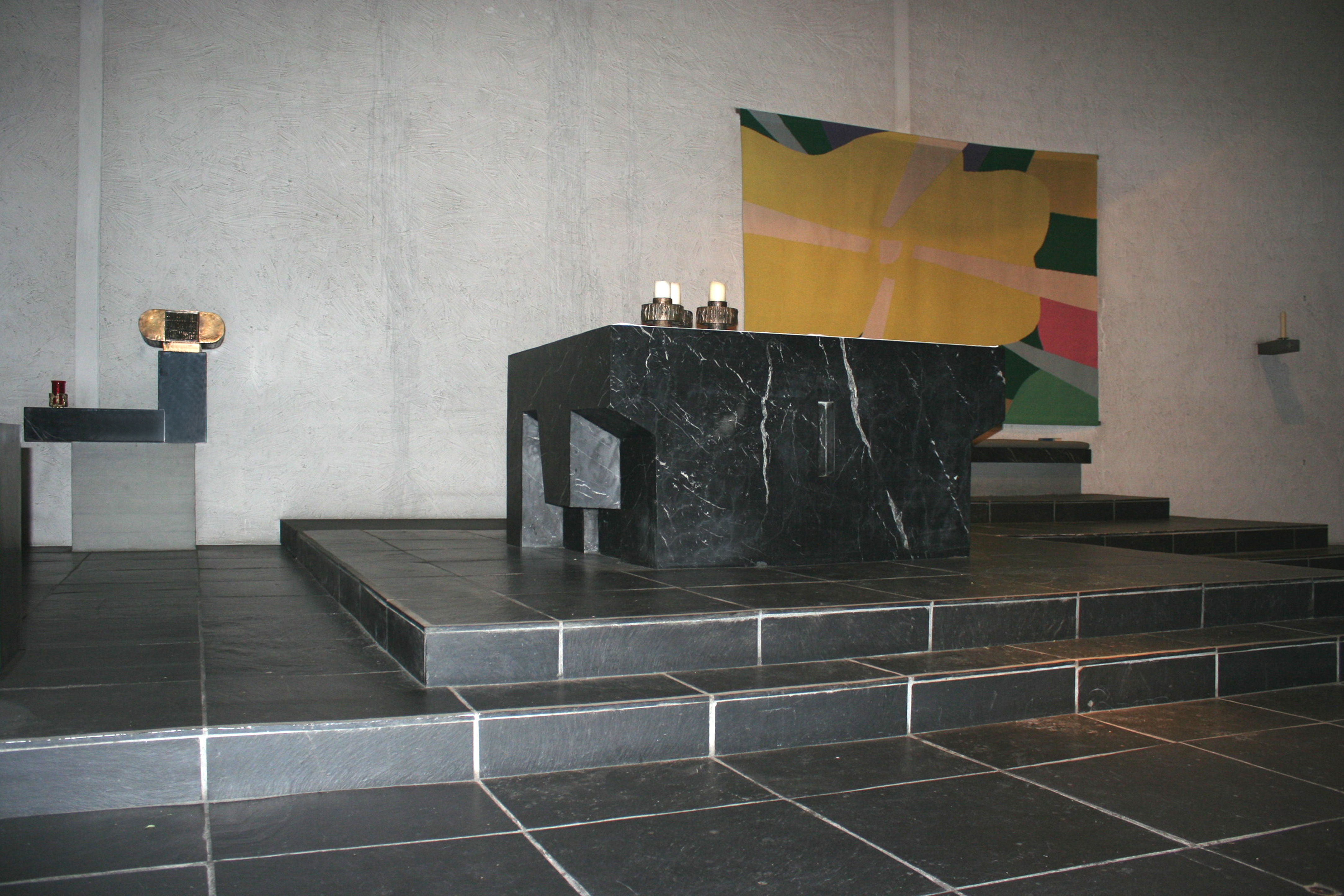 Römisch-katholische Pfarrkirche St. Mauritius Oberengstringen, Altar und Tabernakel